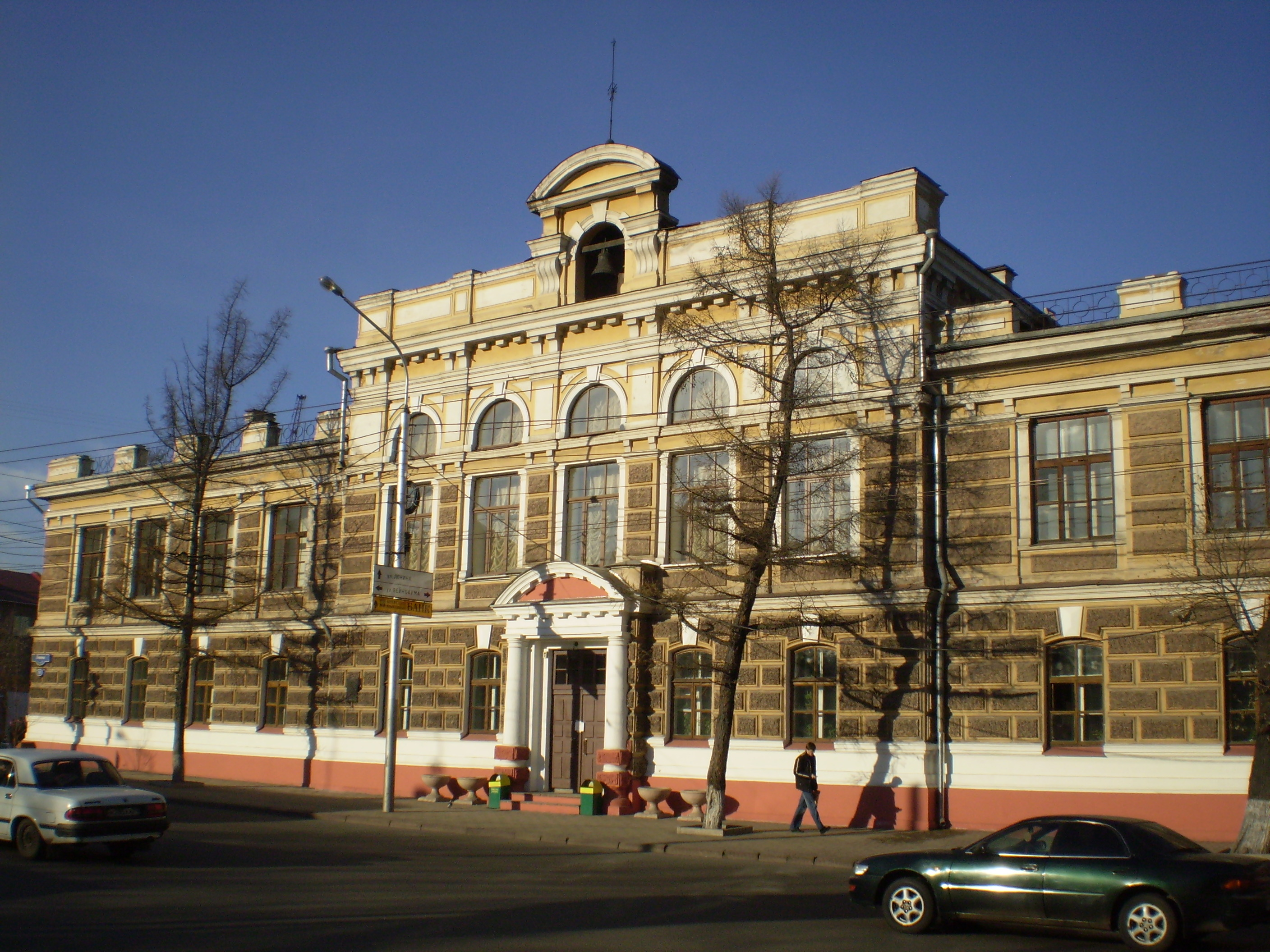 Красноярская губернская мужская гимназия